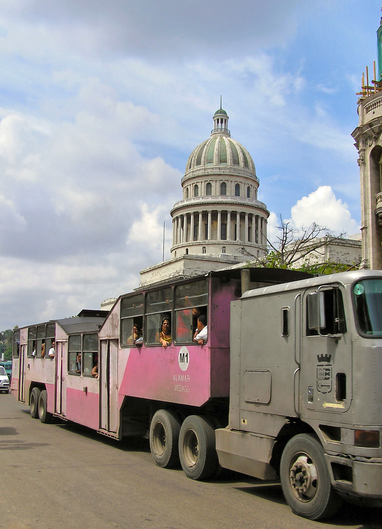 Bus surdimensionné appelé "camelito" dans le quartier du Capitole à La Havane - Cuba